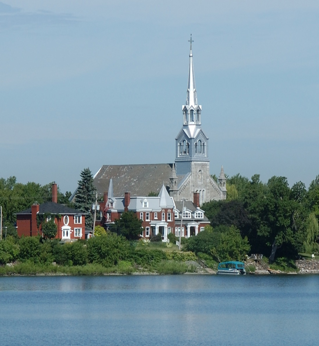 Église catholique Saint-Joseph-de-Chambly